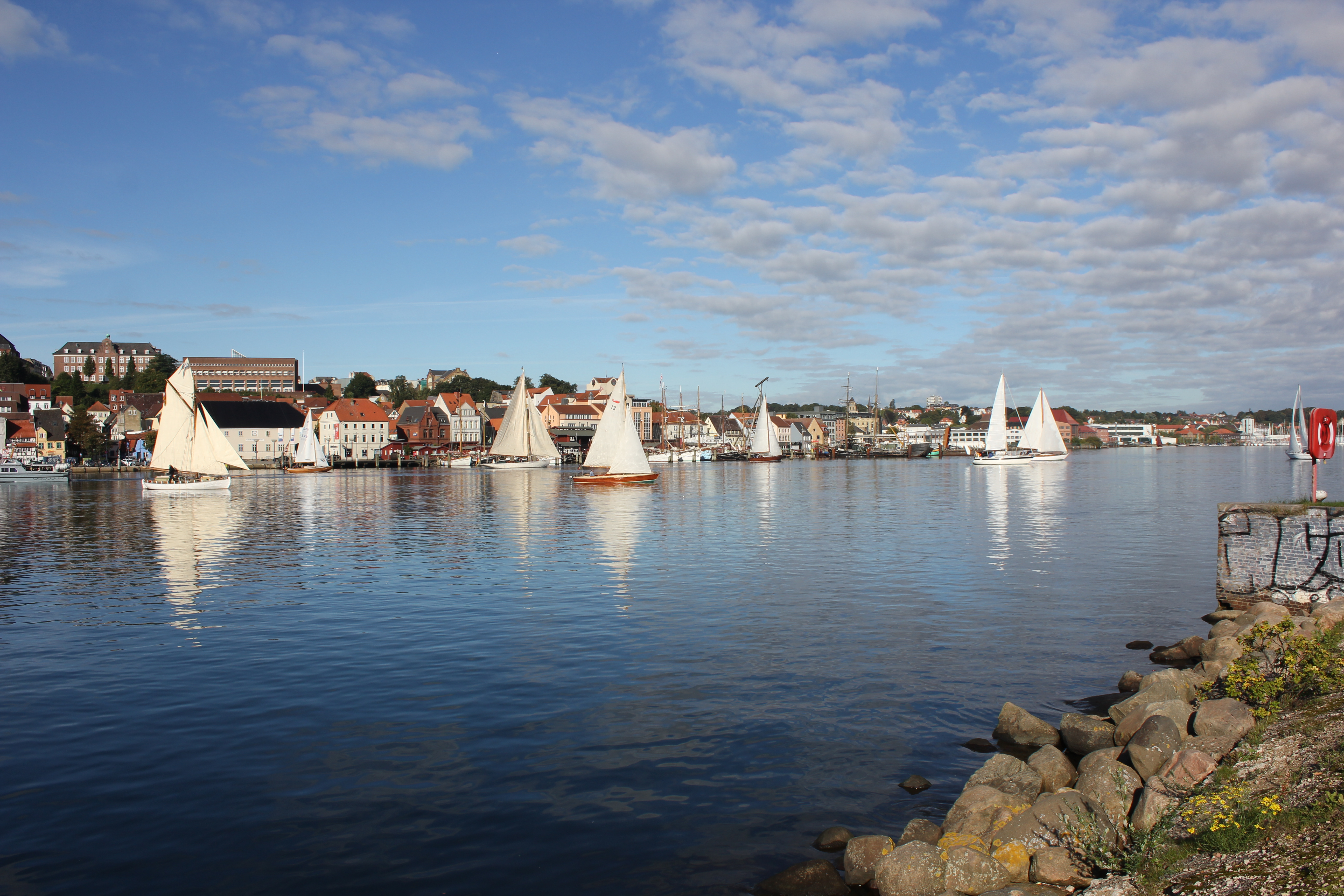 Flensburger Regatta von 1855 (Flensburg 2013), Bild 03